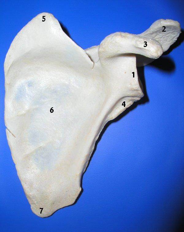 המקור מויקישיתוף נערך על ידי והועלה מחדש